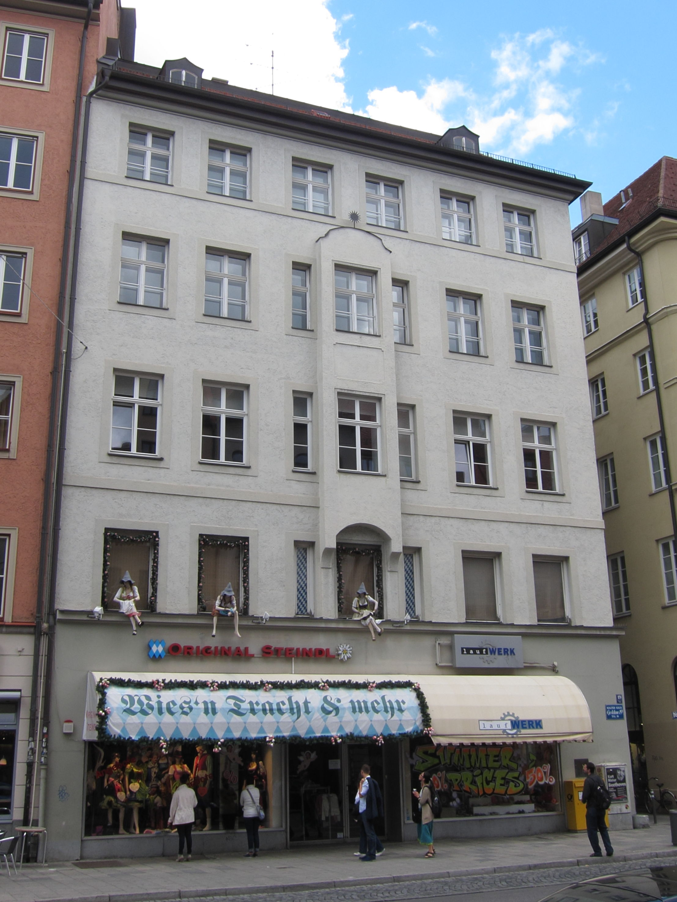 Tal 19; Eckhaus, neubarock, 1894; Hauptfront z. T. vereinfacht.